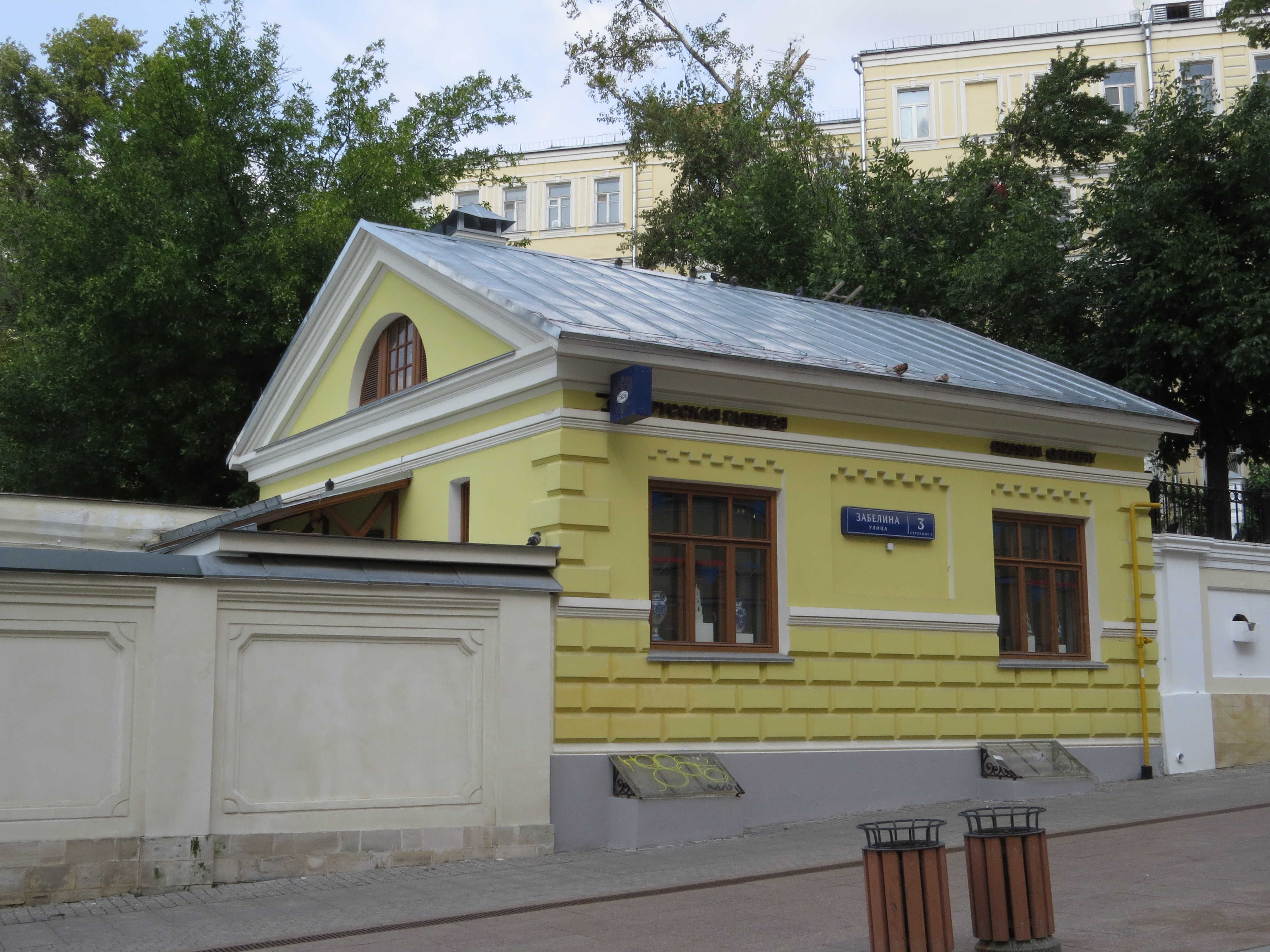 Городская усадьба Н.А. Сумарокова - Н.А. Тюляевой: Забелина ул., дом 3, строение 8, Басманный, Центральный округ, Москва